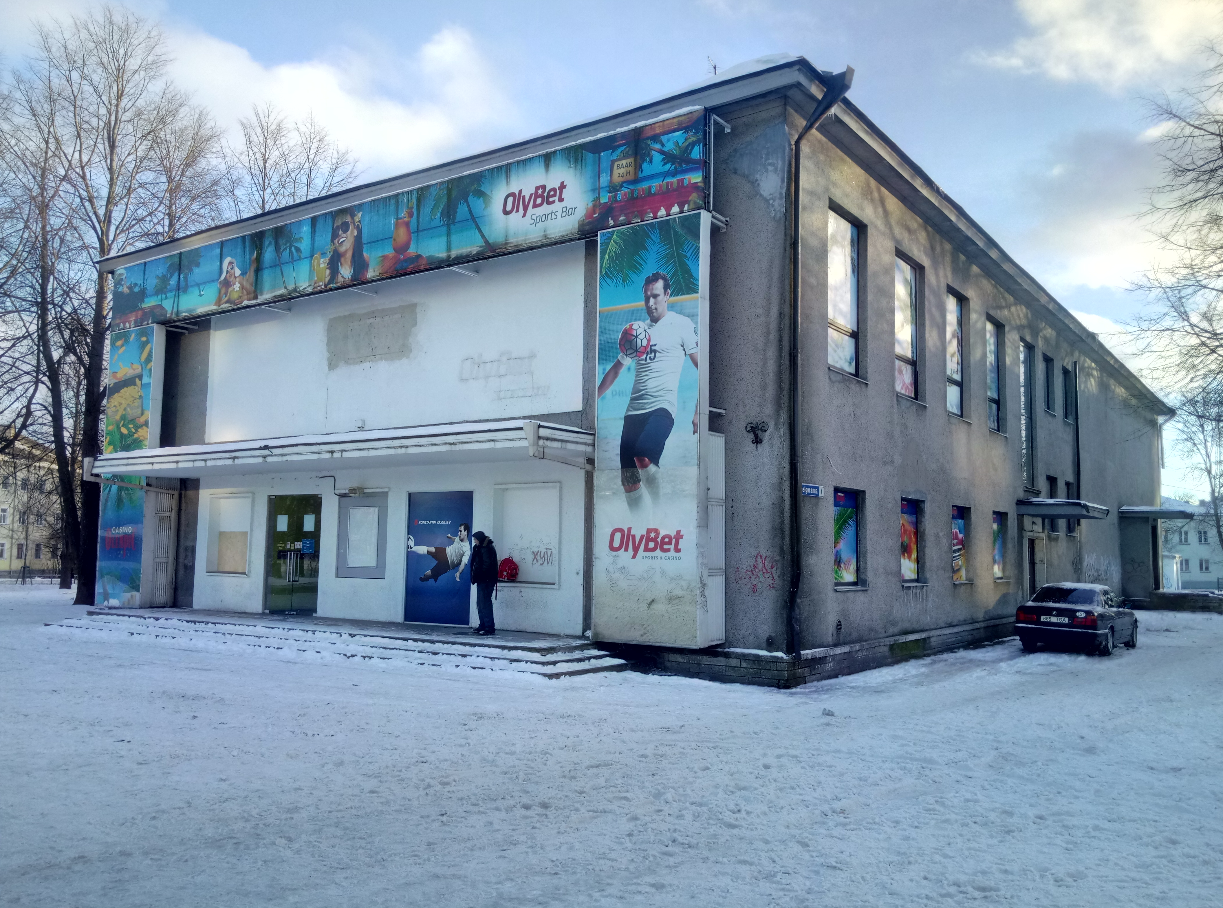 Vaade kinole loodest.Foto: Robert Treufeldt, 16. jaanuar 2019